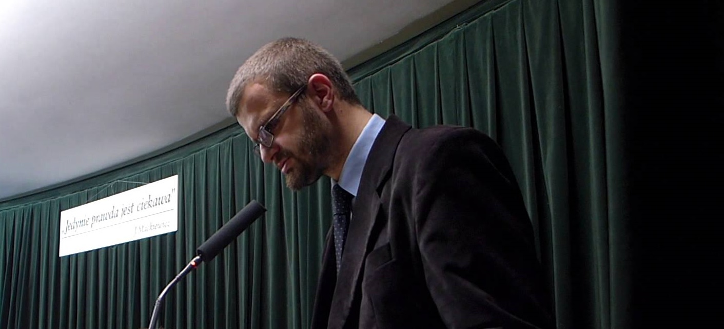 Przemysław Dakowicz, 2015